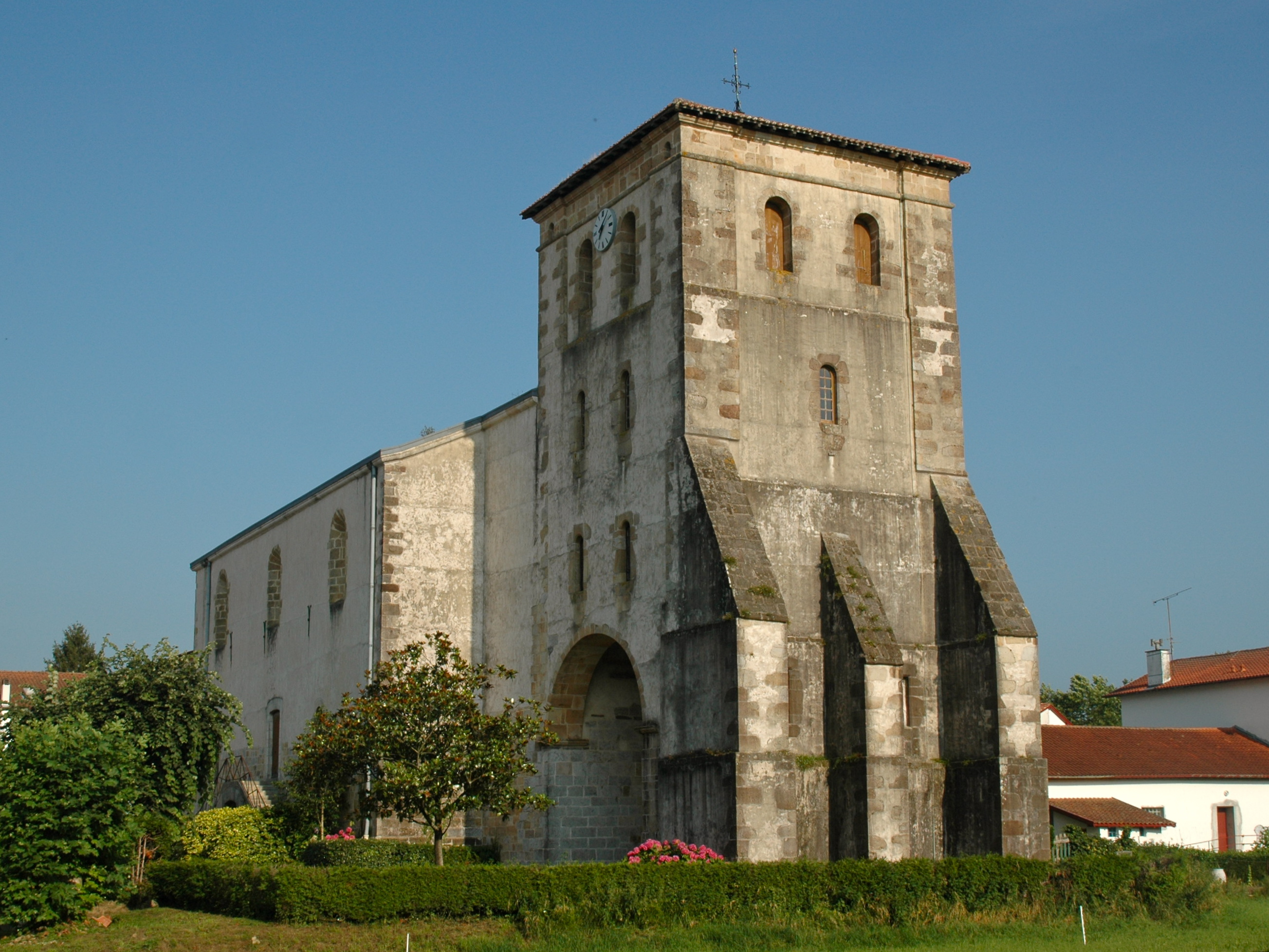 Saint-Pée-sur-Nivelle, l'église. Photo prise le 08/07/06 par Harrieta171